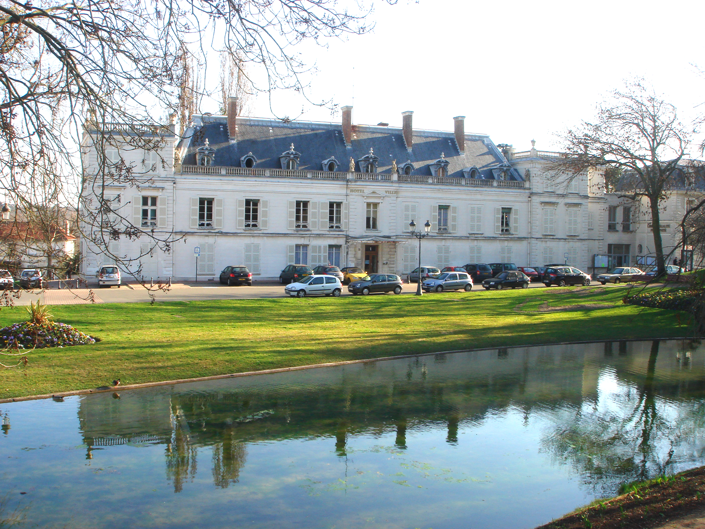 Vue de l'hôtel de ville et de son bassin.